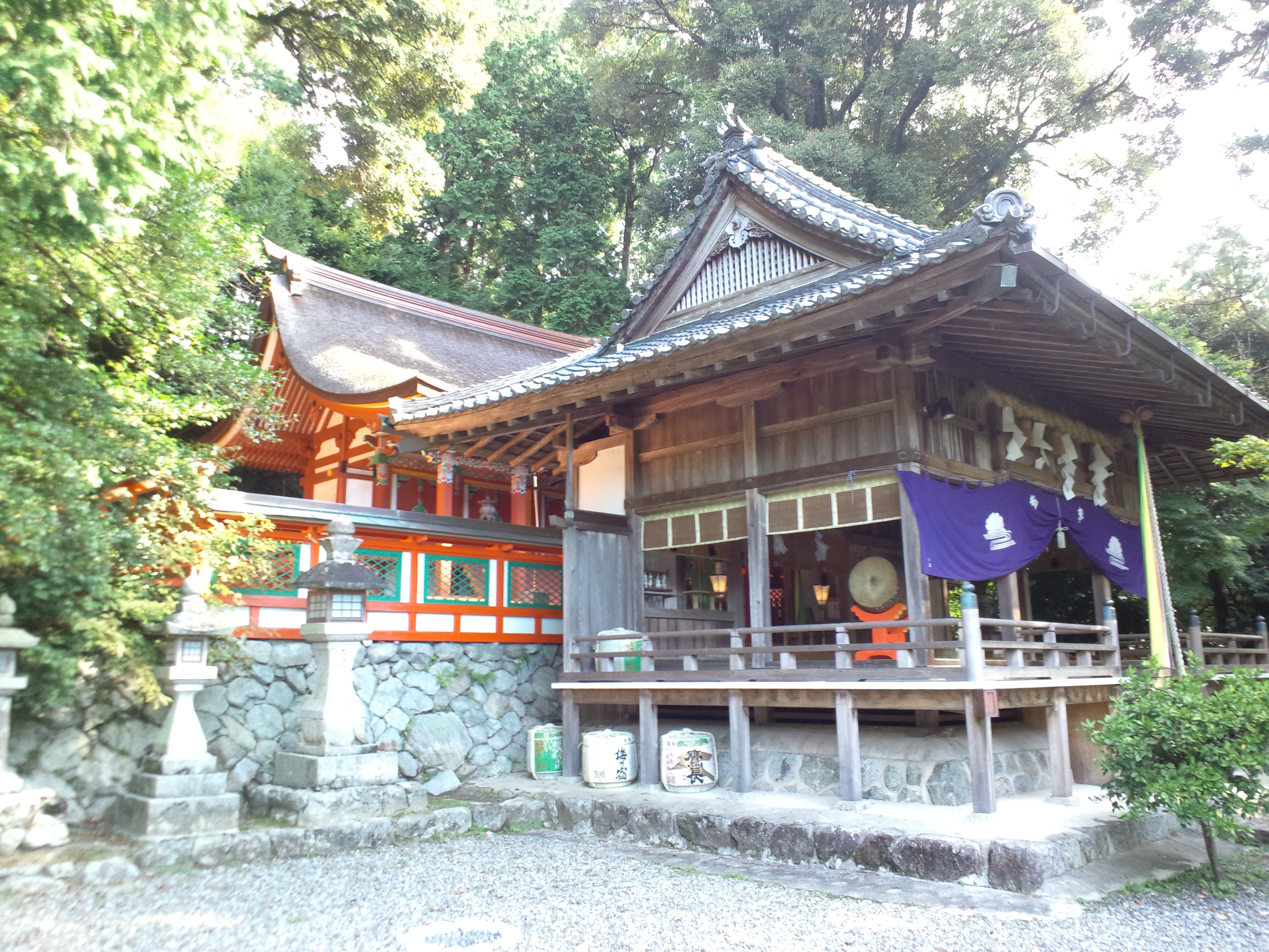 高鴨神社 本殿